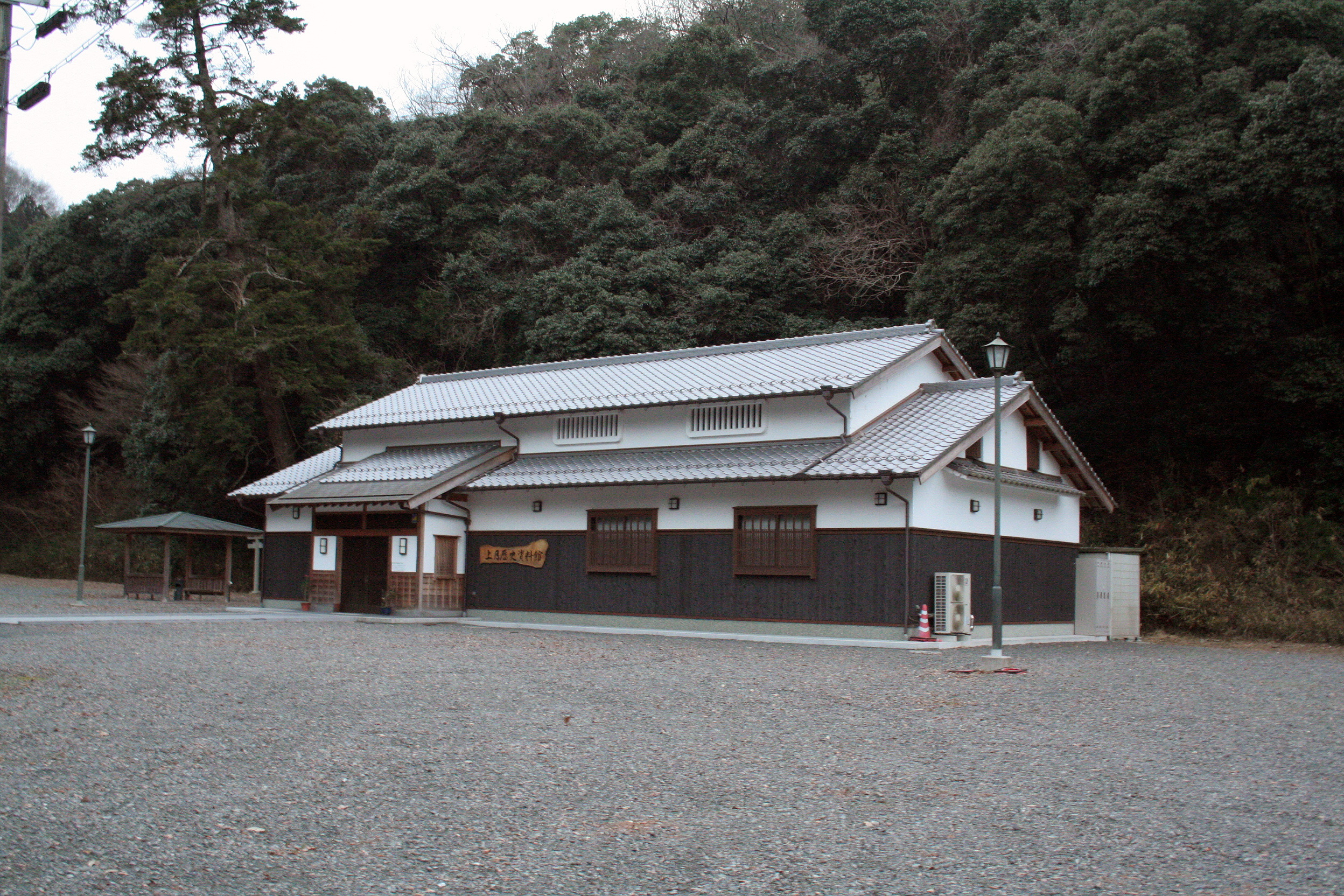 兵庫県佐用郡佐用町の上月城跡地の近くにある上月歴史資料館。